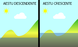 Insula aestuosa aestu crescente et descendente